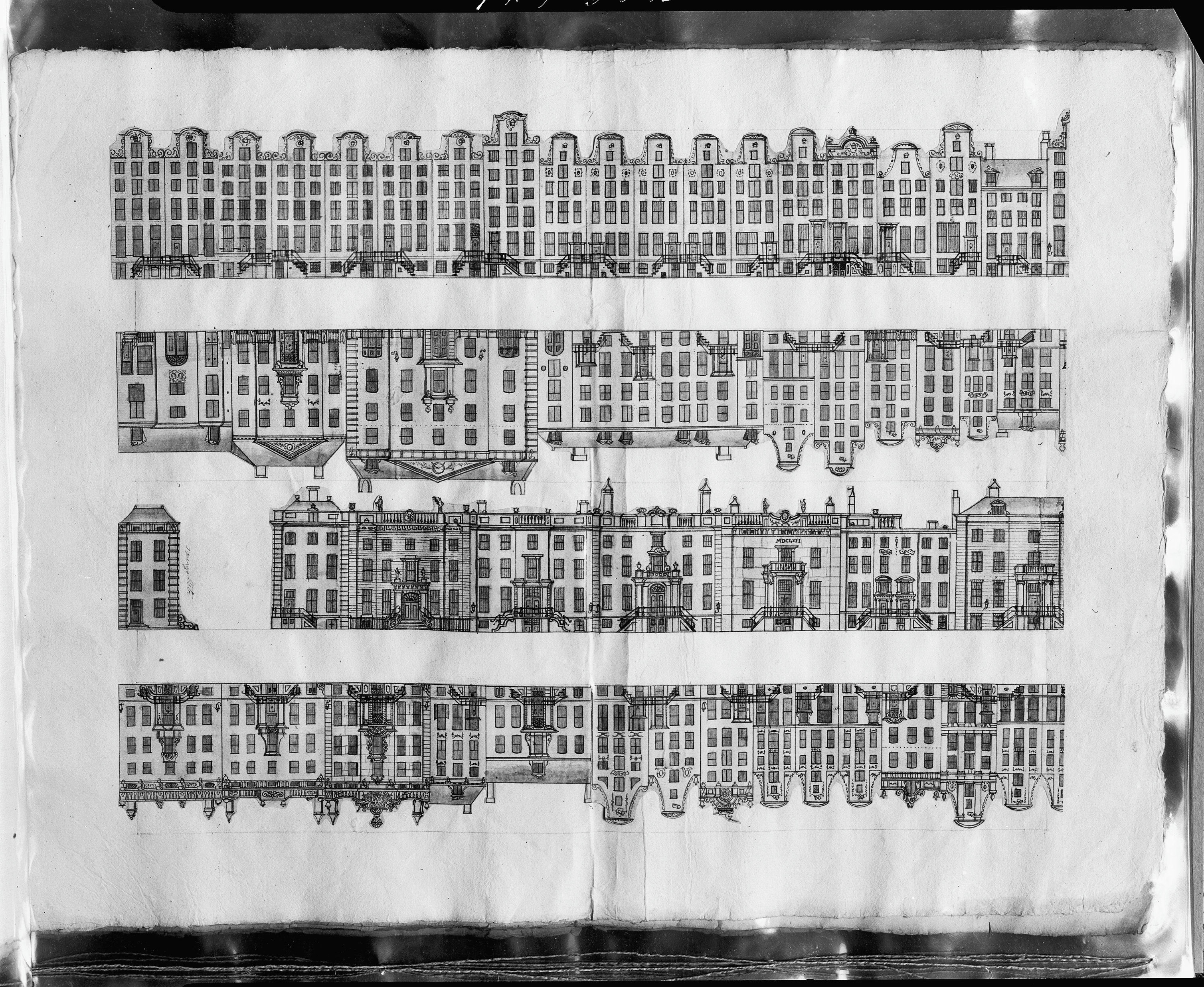 voorgevels grachtenboek This is a possible Rijksmonument: Find the monument in the Monuments database: Herengracht 453-479 in Amsterdam All Rijksmonumenten in Amsterdam Is this a Rijksmonument? Yes No More information about this project and help. More images to work at in Category:Possible Rijksmonumenten.